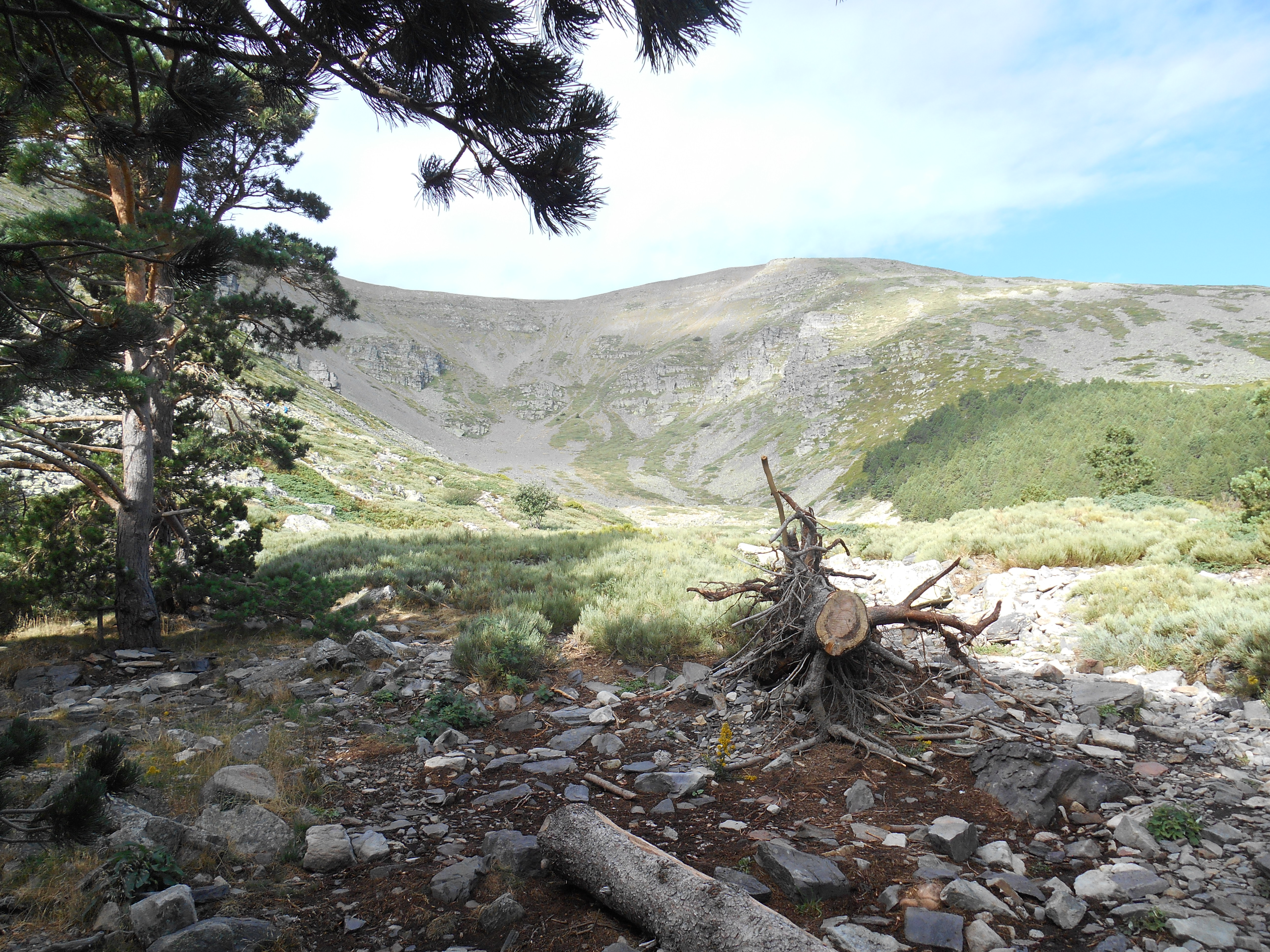 Aragonés: Pozo de Sant Miguel (Moncayo)